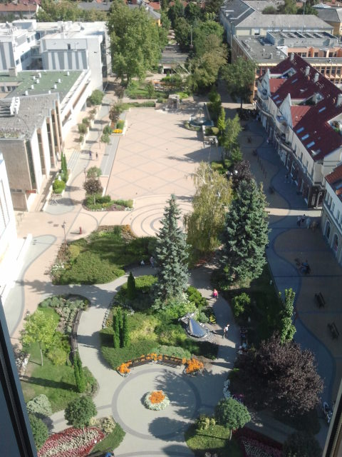 Siófok főtere a víztoronyból